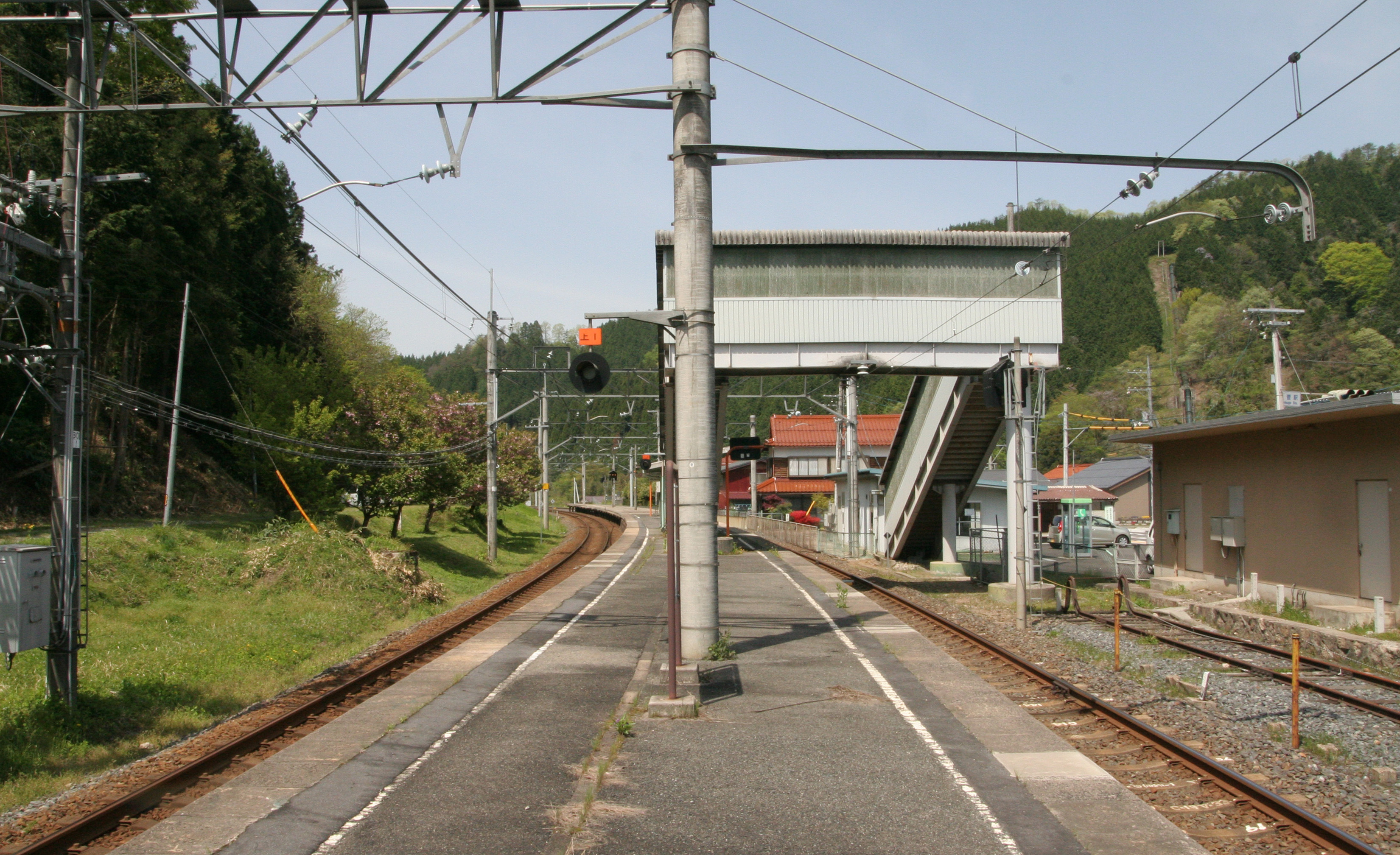 上菅駅の構内